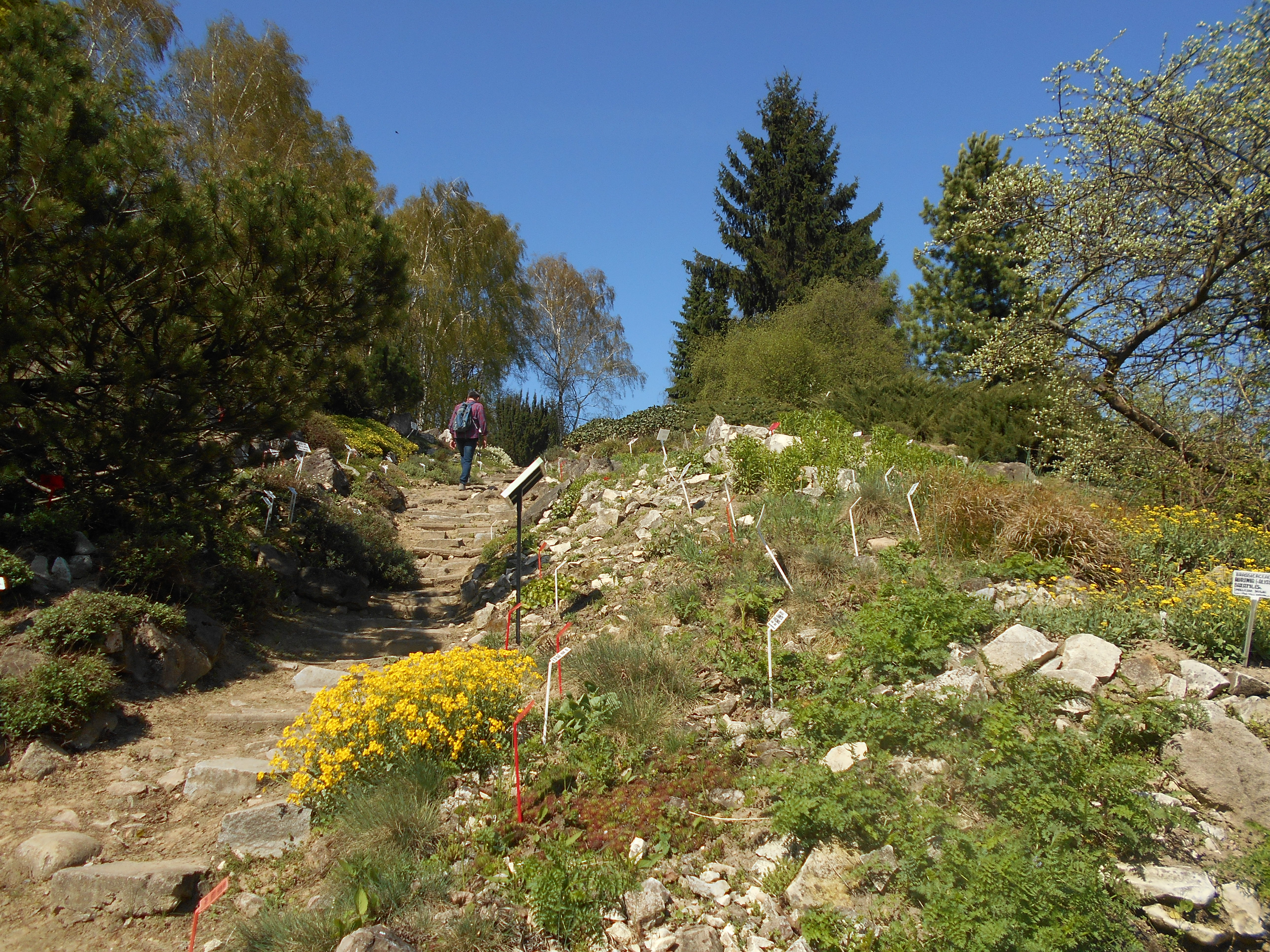 Ogród Botaniczny UMCS w Lublinie